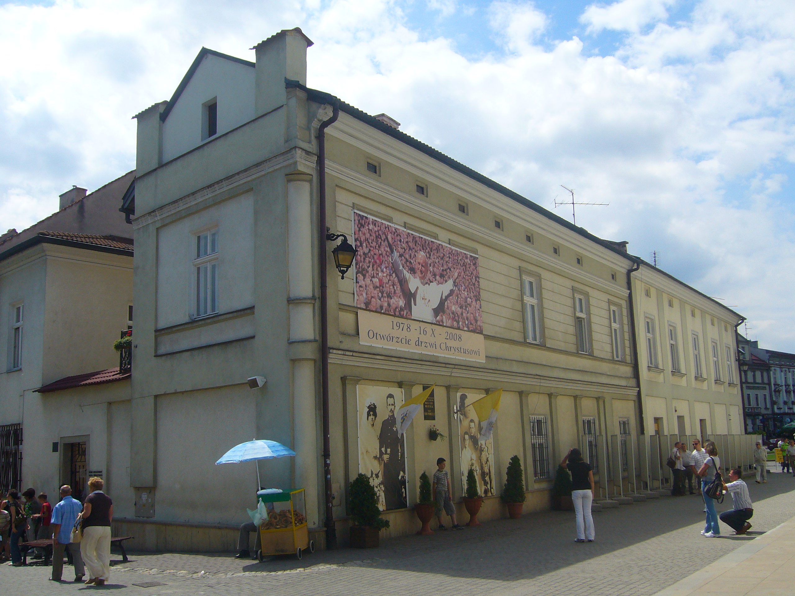 Rodný dům Jana Pawla II. v Vadovicích.